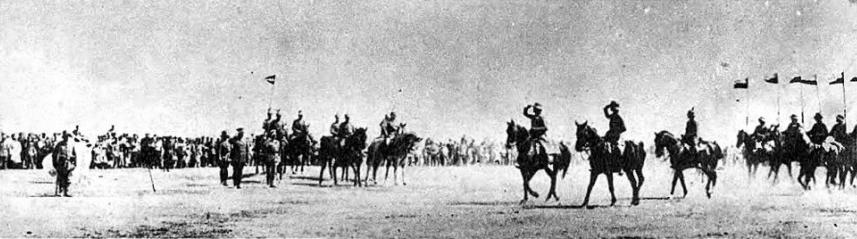 Луганск. Парад германской кавалерии 1918